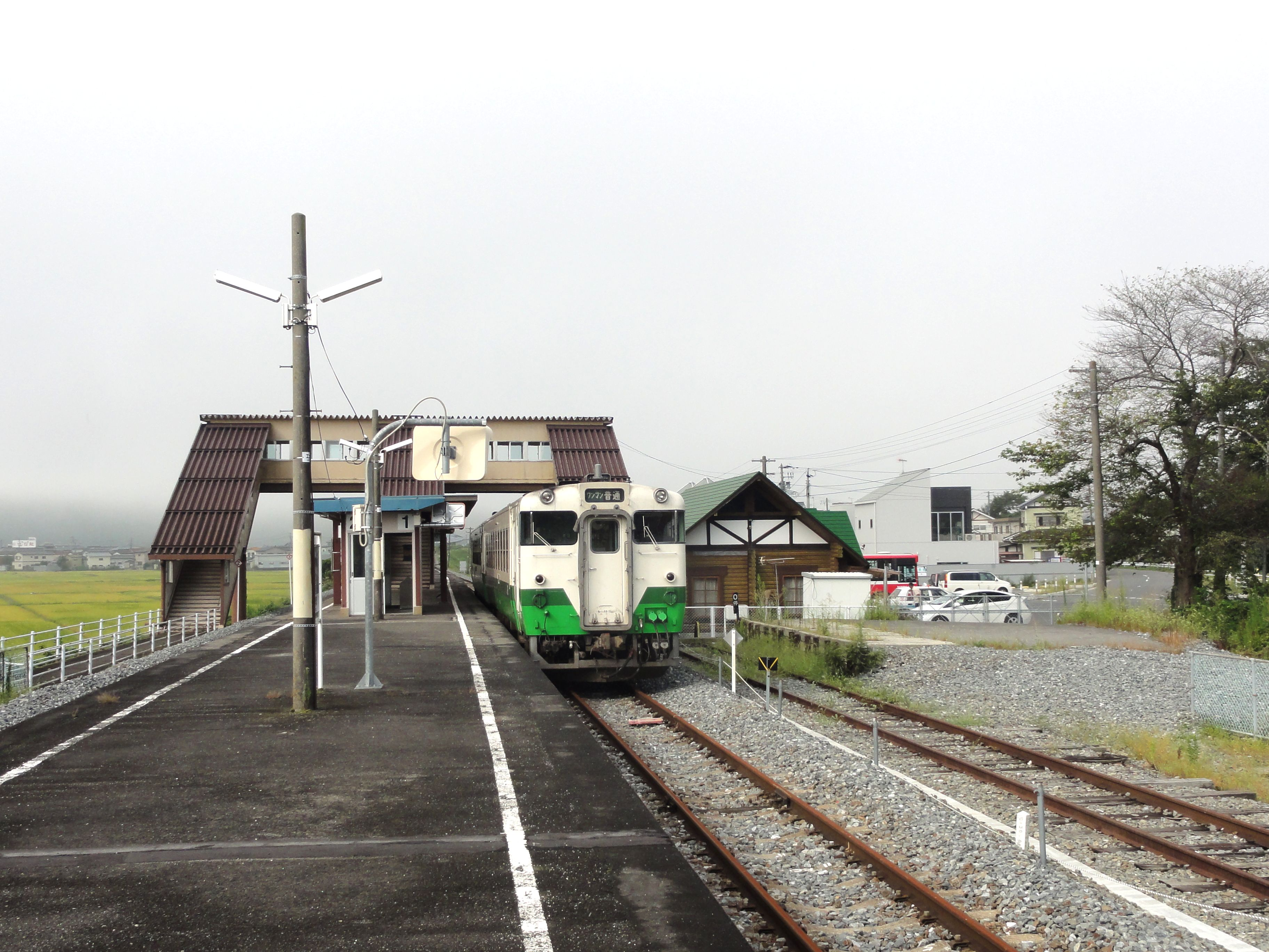 柳津駅ホーム